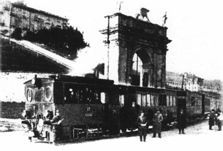 Vicenza, il tram per Montagnana in transito davanti all'Arco delle Scalette.